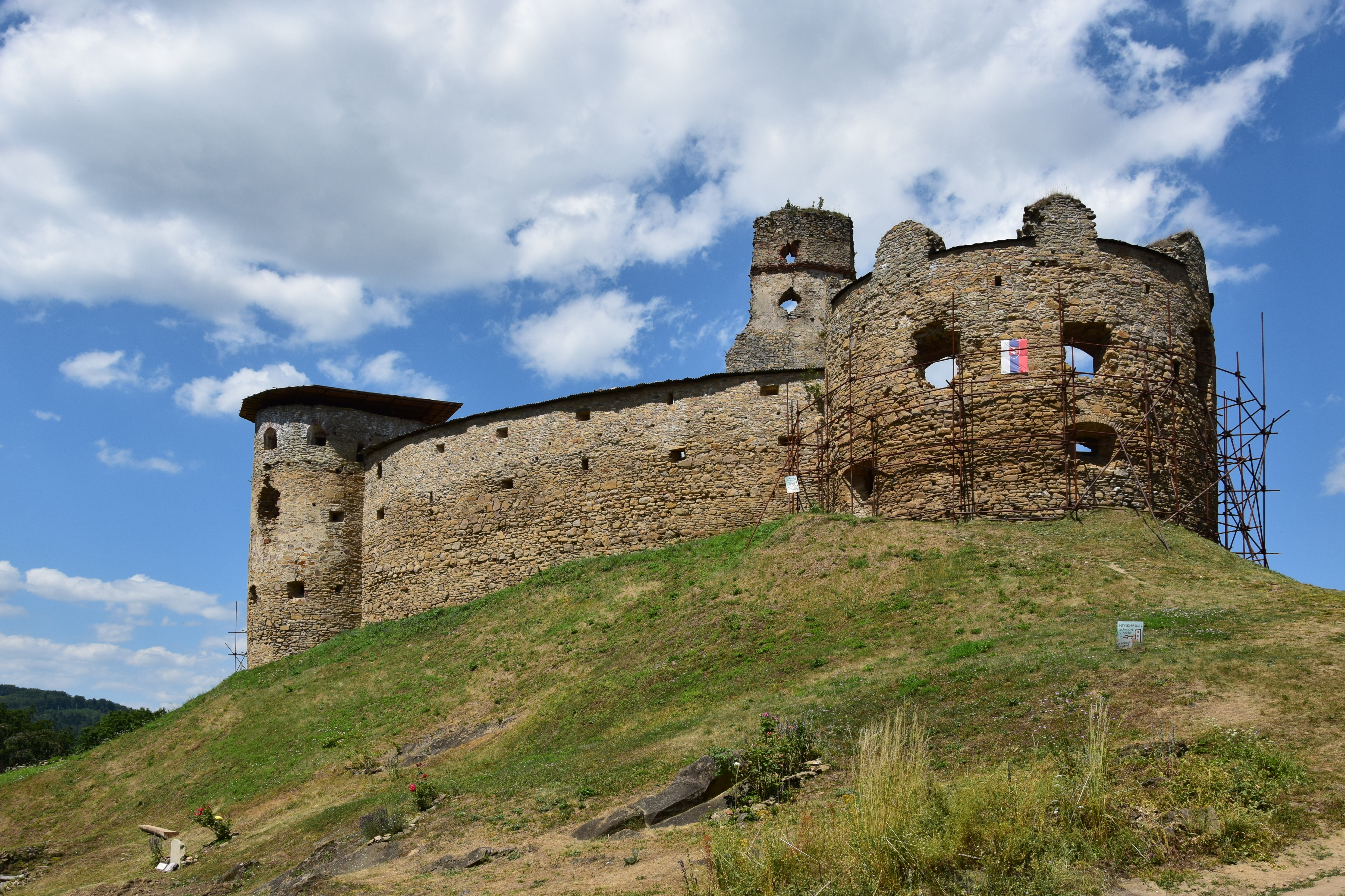 Zborov – horní hrad